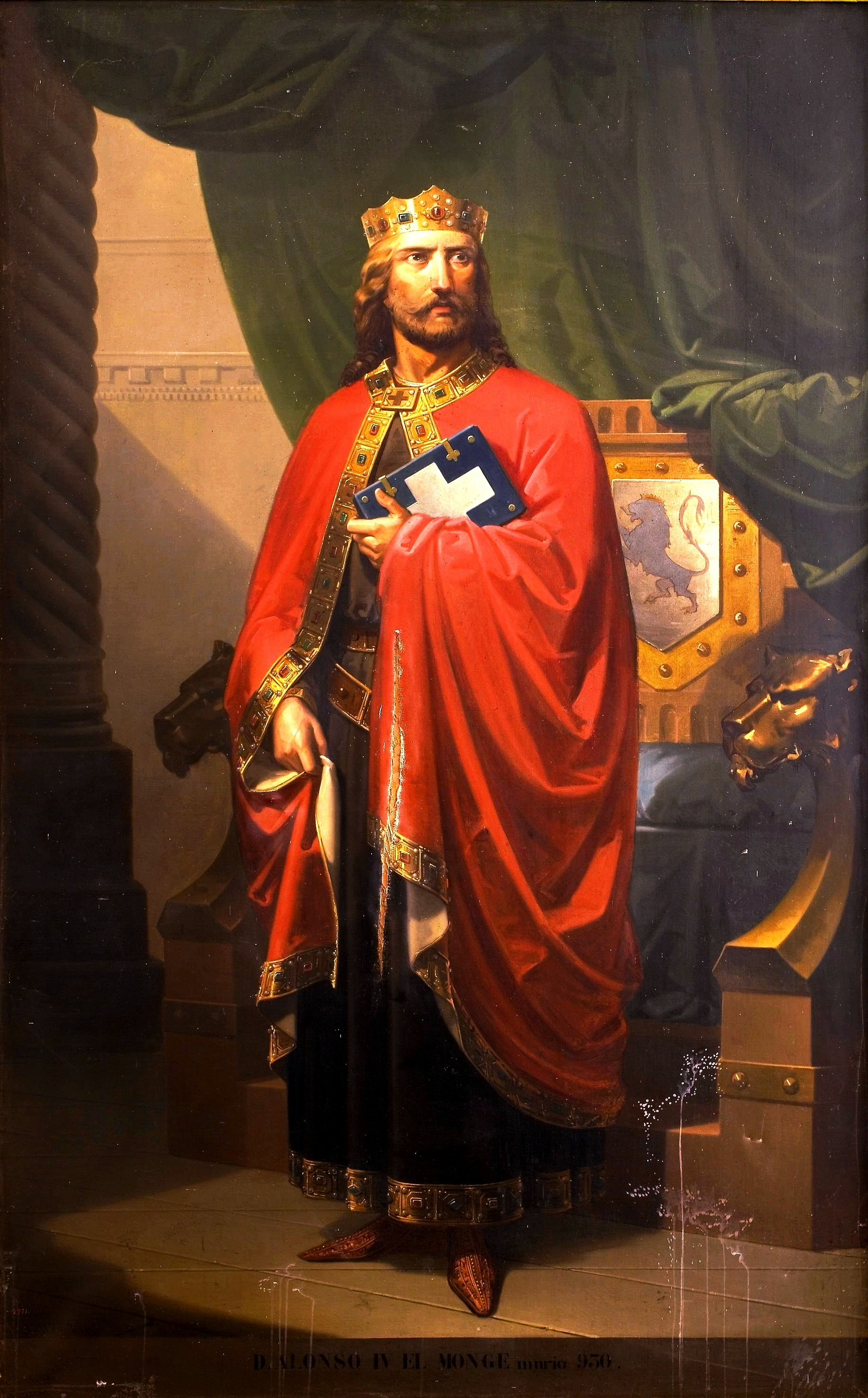 Retrato imaginario del rey Alfonso IV de León († 933). Fue hijo del rey Ordoño II de León y de la reina Elvira Menéndez. Fue coronado en el año 926 y renunció al trono tras la muerte de su esposa, la reina Oneca de Pamplona. Tras su abdicación ingresó como religioso en el monasterio de Sahagún, pero intentó recuperar el trono leonés y su hermano, Ramiro II de León, que ya reinaba en su lugar, le capturó y ordenó que fuera cegado. Falleció en el año 933 en el desaparecido monasterio de San Julián y Santa Basilisa de Ruiforco.